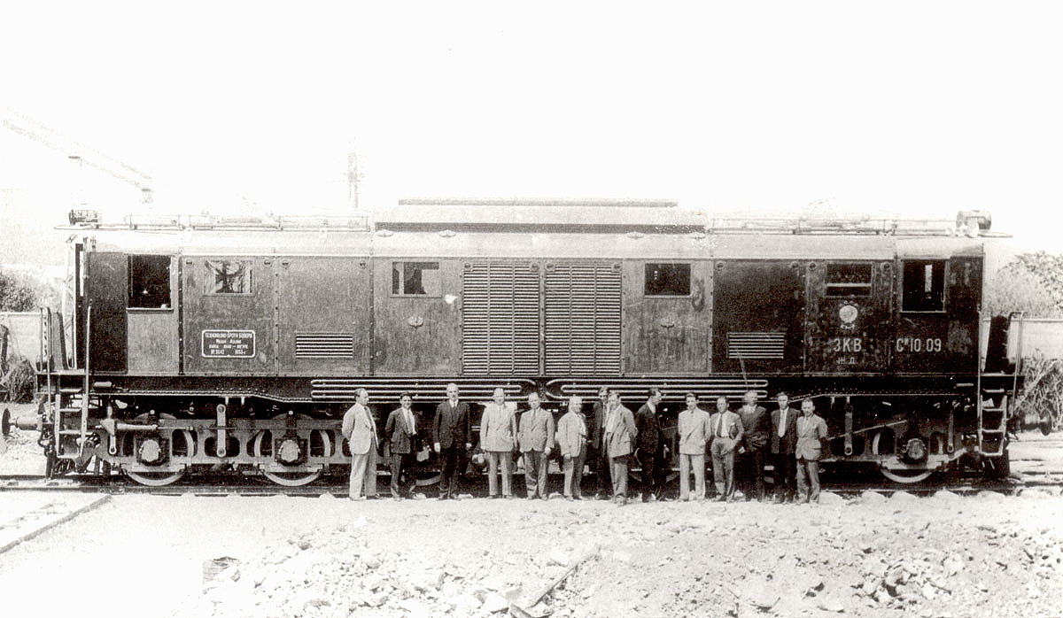 Электровоз СИ в депо Хашури